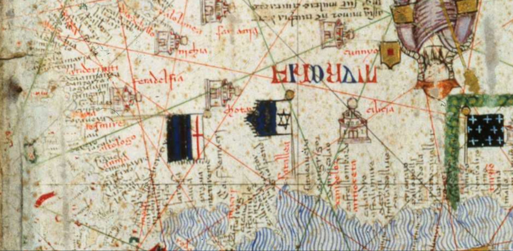 L’Atlas catalan, fol.9, det